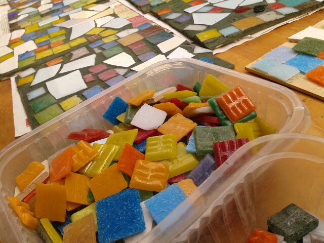 El color de la calle Lanin. En la foto apreciamos un material llamado comúnmente como “venecitas” que está hecho con restos de cerámica y de una capa muy fina. El artista Mariano Santa María las utilizó para un proyecto de murales con mosaicos en muchas de las paredes de la calle Lanín, en el barrio de Barracas de la ciudad de Buenos Aires. El lugar se ha convertido en una atracción turística del lugar